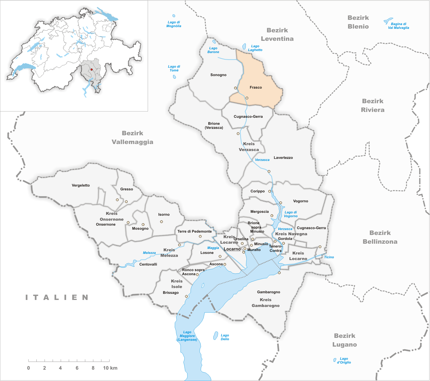 Municipality Frasco